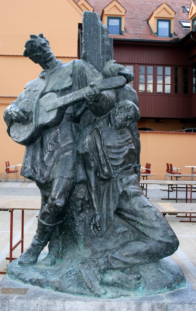 Kip Petrice Kerempuha na Dolcu u Zagrebu, djelo kipara Vanje Radauša, postavljen 1955. godine na malen trg na kojem se preko dana prodaje cvijeće